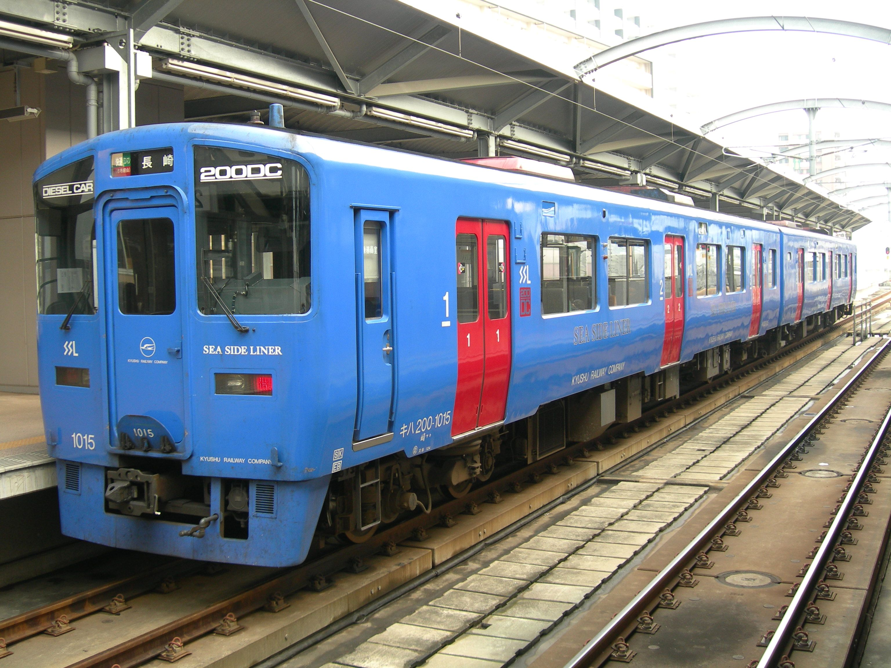 JR九州キハ200系気動車